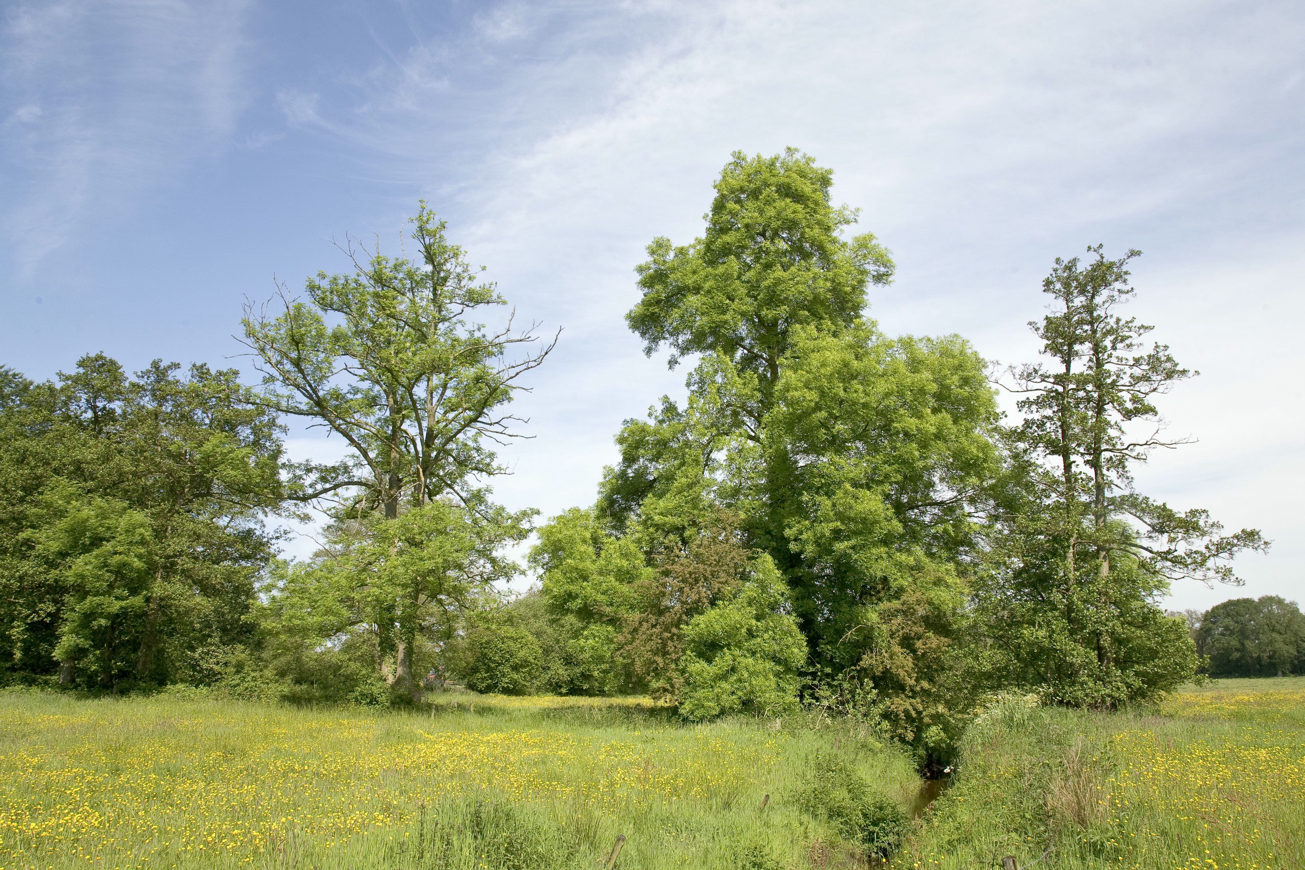 Anloërdiep: Zicht op het beekdal van het Anloërdiep (opmerking: Gemaakt voor publicatie landschapsbiografie Drentse Aa)